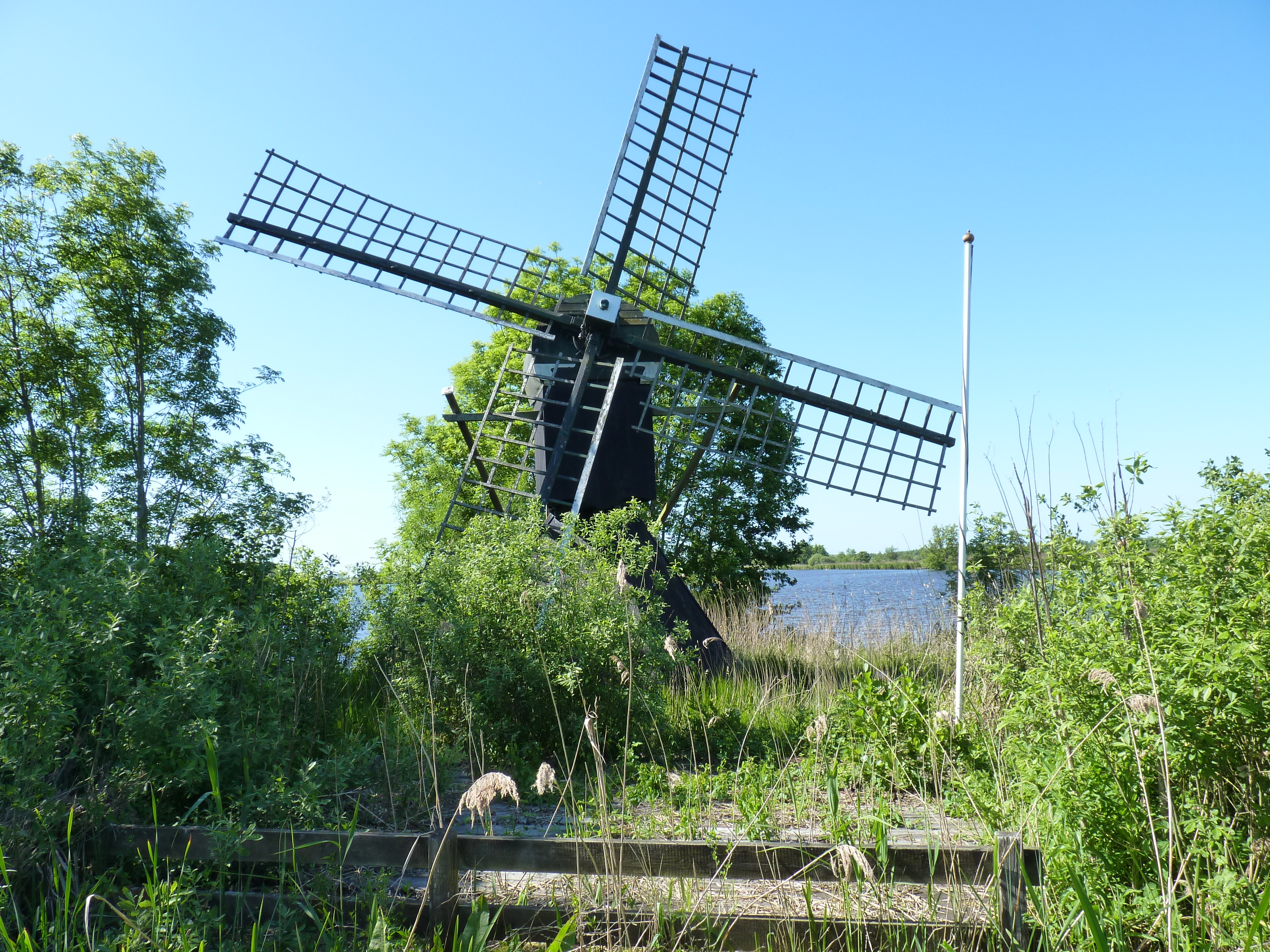 Eernewoude Spinnekopmolen Princehofmolen